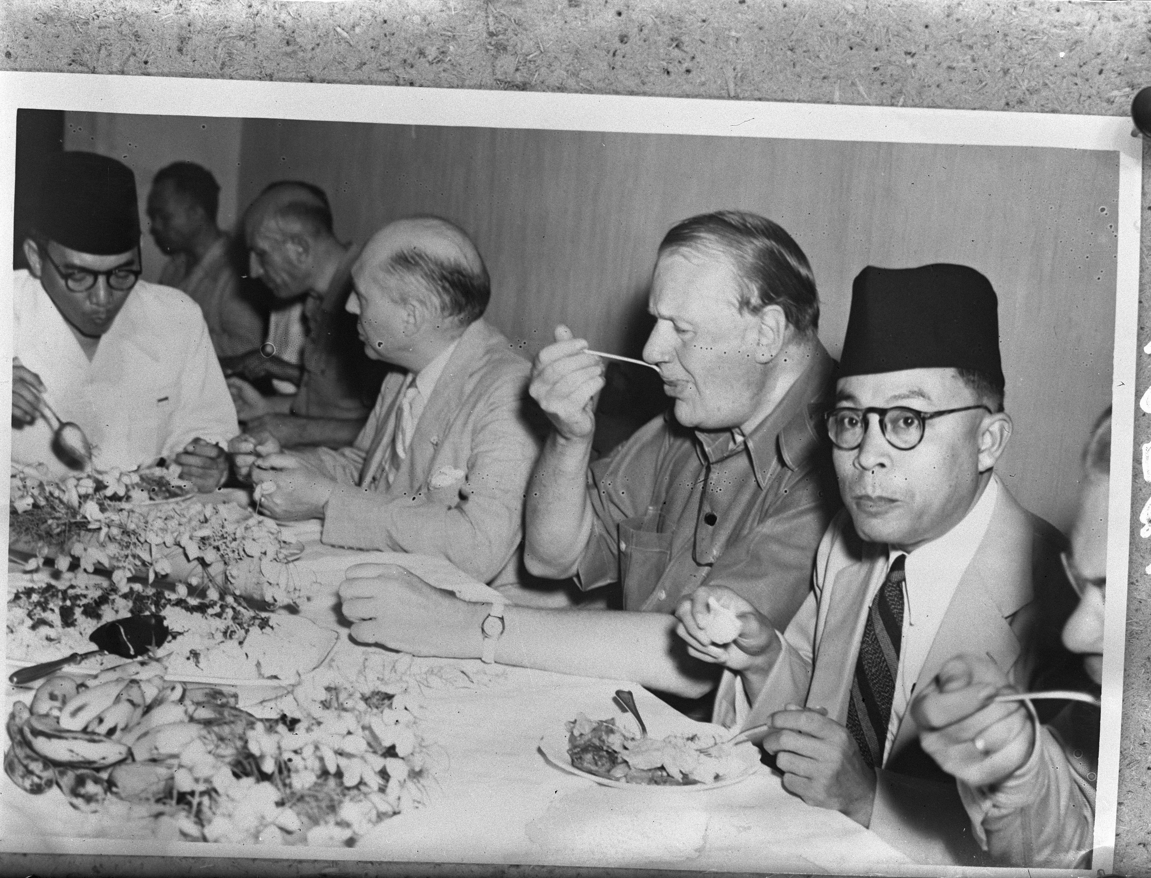 Collectie / Archief : Fotocollectie Anefo Reportage / Serie : [ onbekend ] Beschrijving : Overeenkomst van Linggadjati. Deelnemers aan de conferentie Ir. Soekarno , Prof. Schermerhorn , Lord Killaern en dr. Mohammad Hatta aan de maaltijd Datum : 15 november 1946 Locatie : Indonesië, Linggadjati, Nederlands-Indië Trefwoorden : onderhandelingen, overeenkomsten, politiek Persoonsnaam : Hatta, Mohammad, Killaern, Soekarno Fotograaf : NIGIS [Netherlands Indies Government Information Service] Auteursrechthebbende : Nationaal Archief Materiaalsoort : Glasnegatief Nummer archiefinventaris : bekijk toegang 2.24.01.09 Bestanddeelnummer : 901-9574